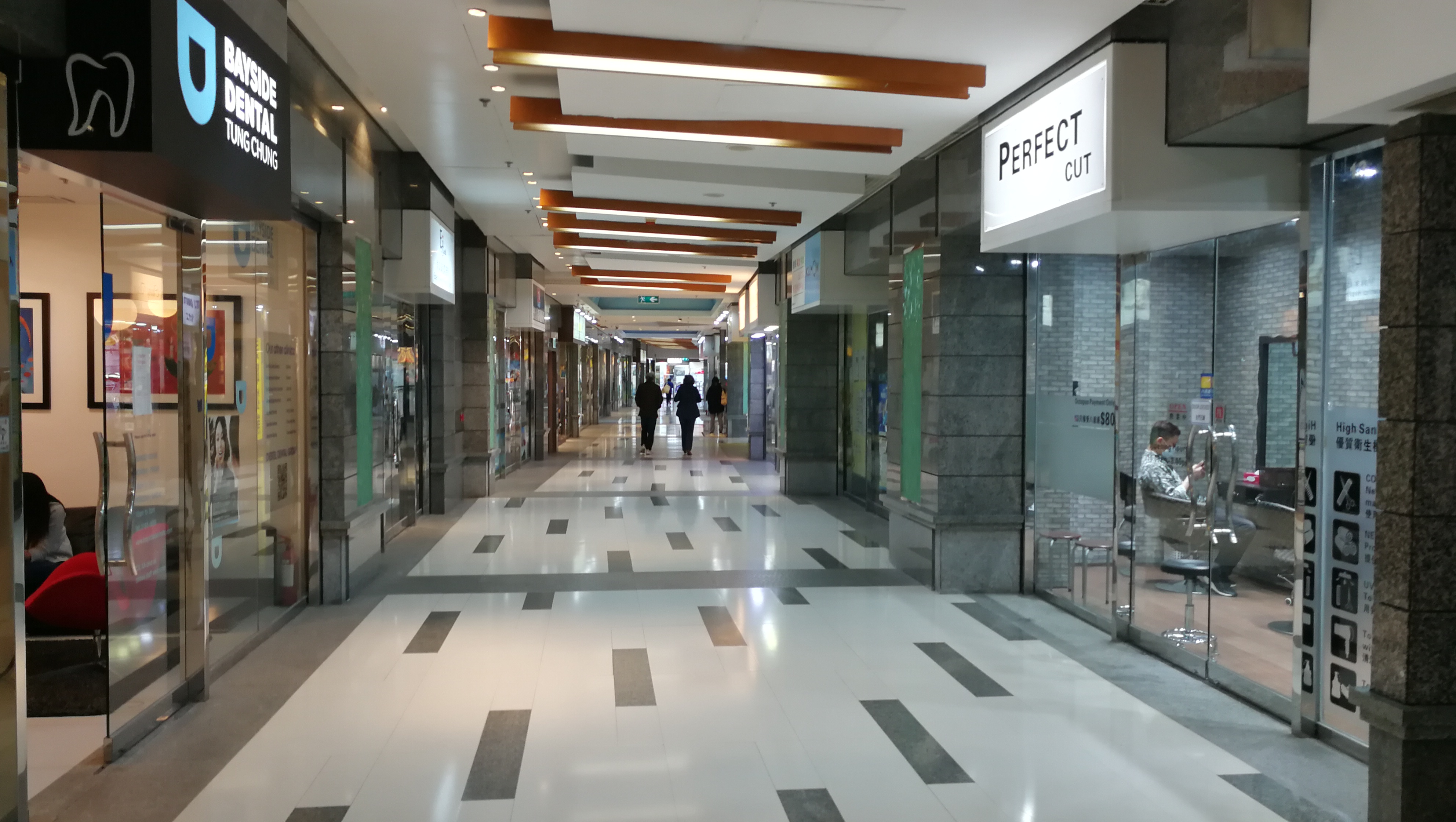 東涌映灣薈